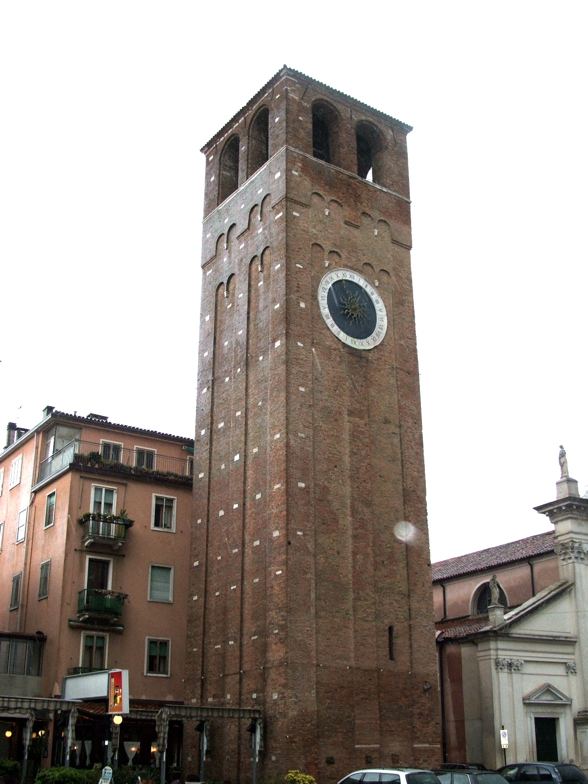 Chioggia, laguna veneta